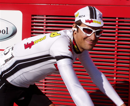 Wielrenner Michael Barry vlak voor de start van de Amstel Gold Race 2008